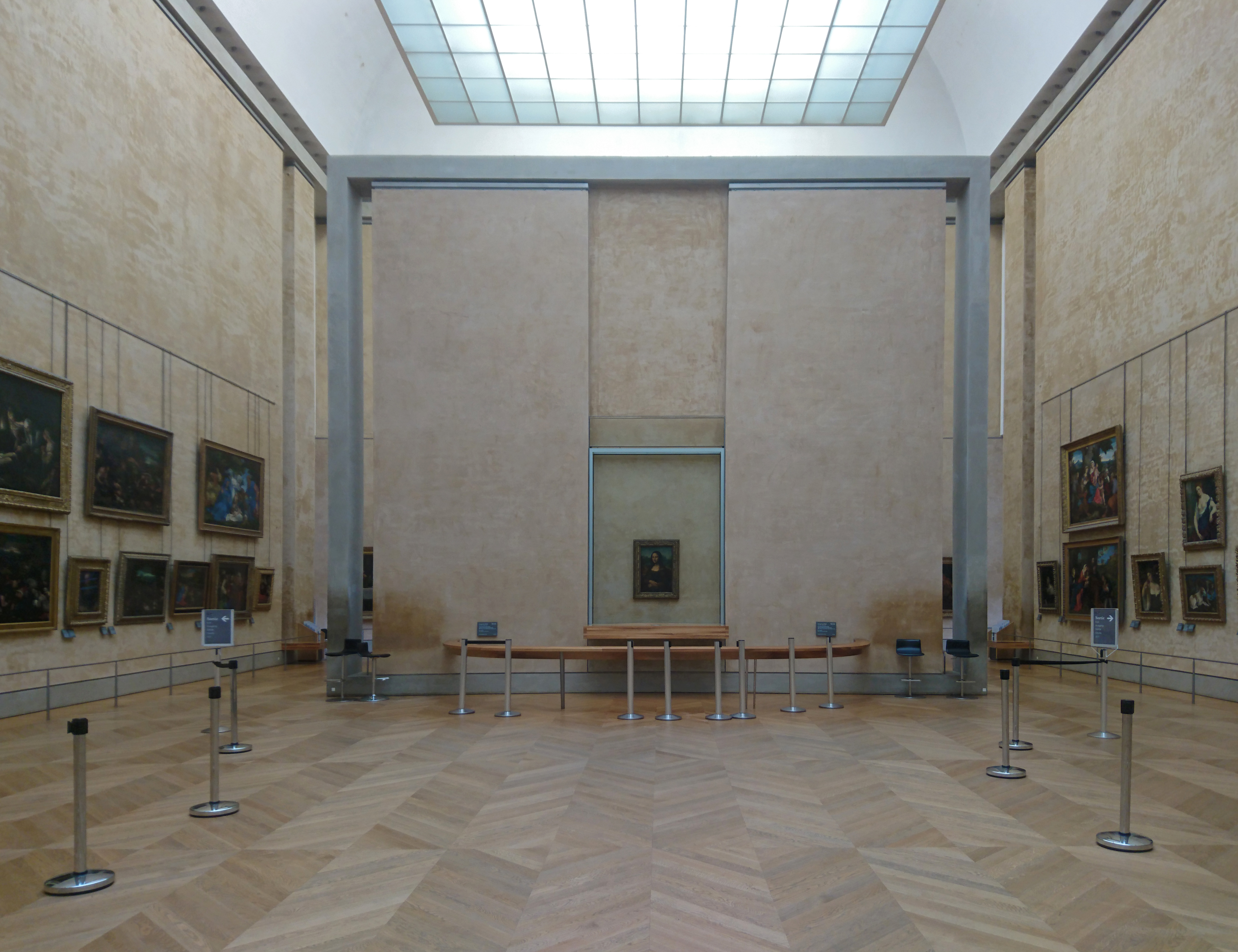 Salle de la Joconde - Musée du Louvre